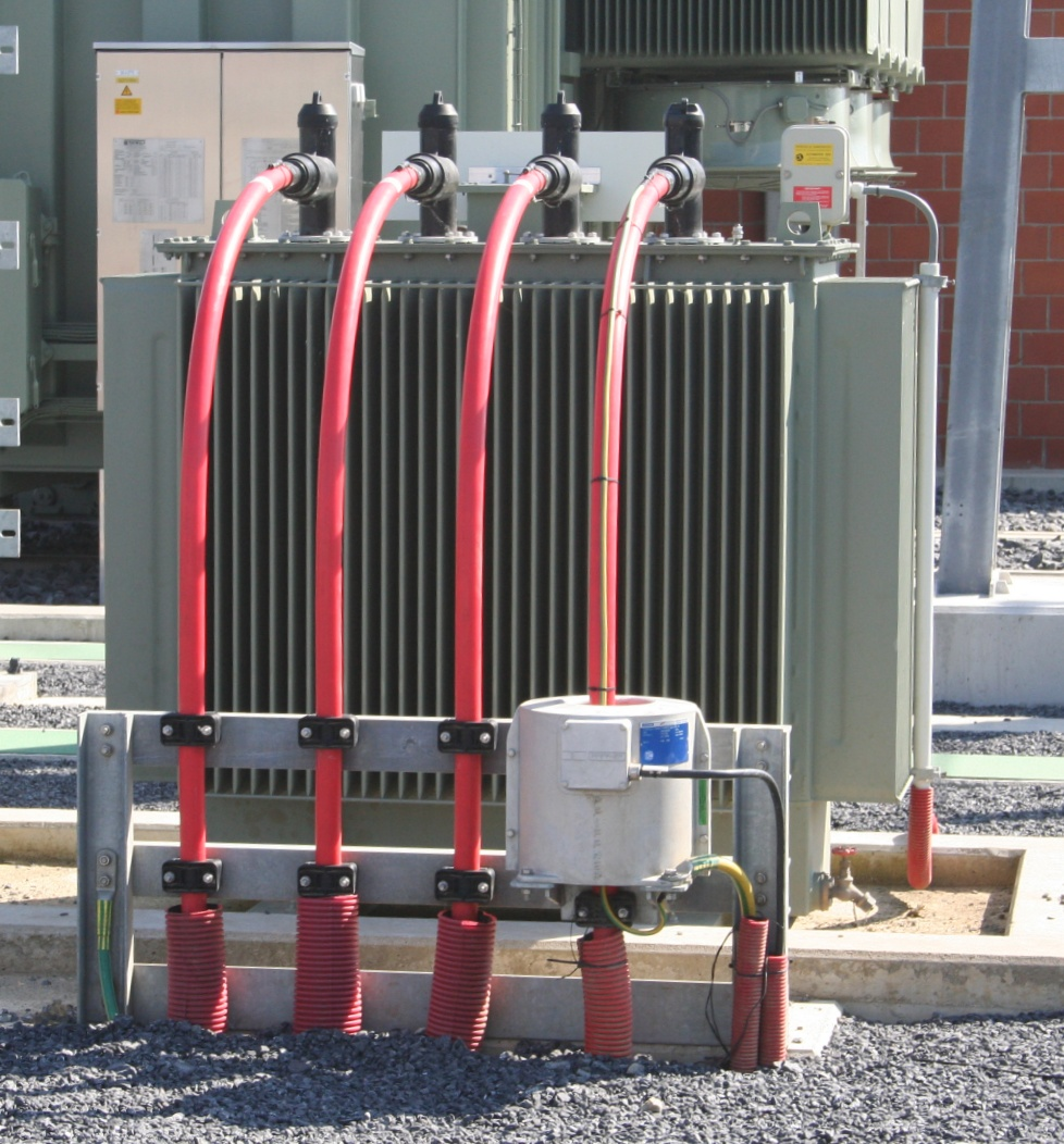 Een aardingstransformator op 36 kV in een 400 kV onderstation met een stroomtransformator over het sterpunt